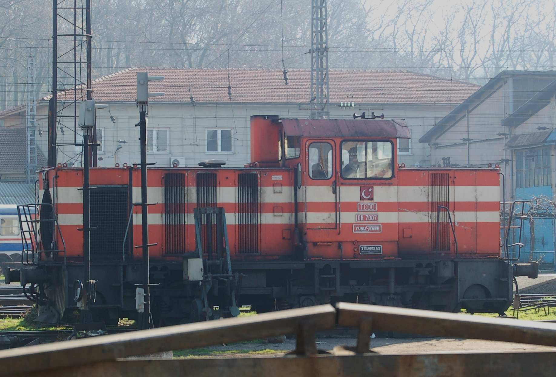 TCDD DH7007 shunter at Sirkeci, Istanbul, Turkey